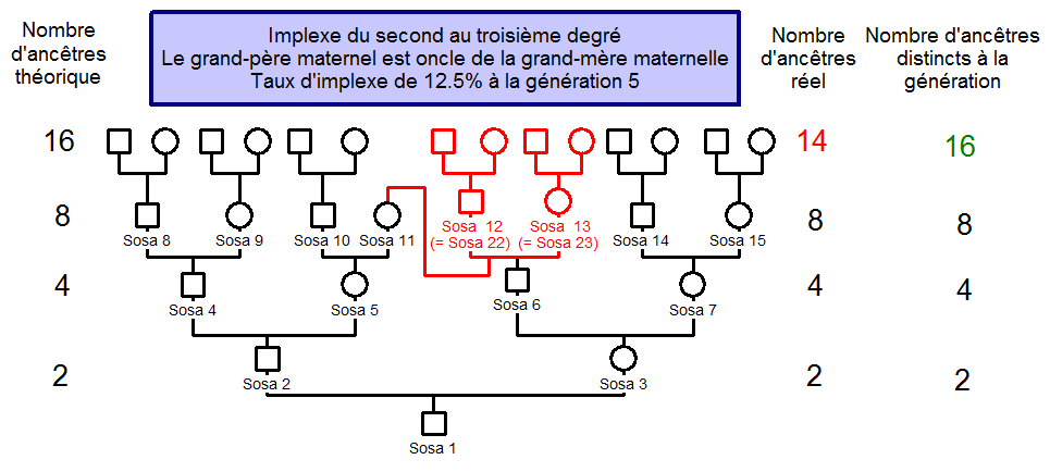 Exemple d'implexe croisant les générations